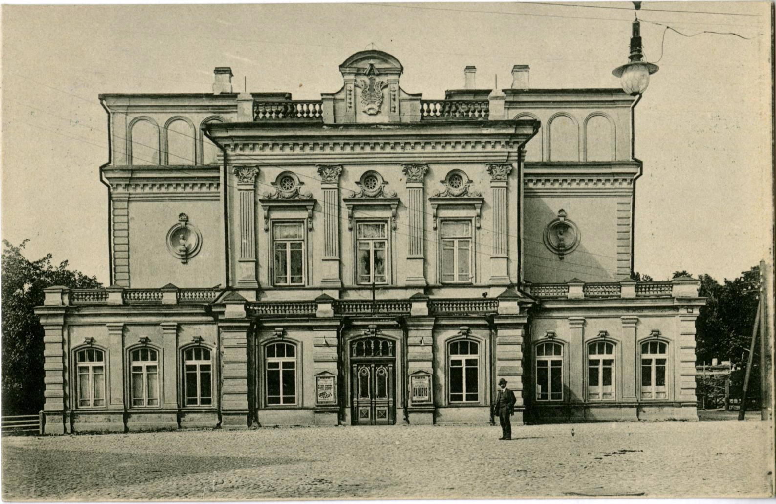 Беларуская (тарашкевіца): Менск (Miensk). Мескі, цяпер Купалаўскі тэатар (Kupałaŭski).